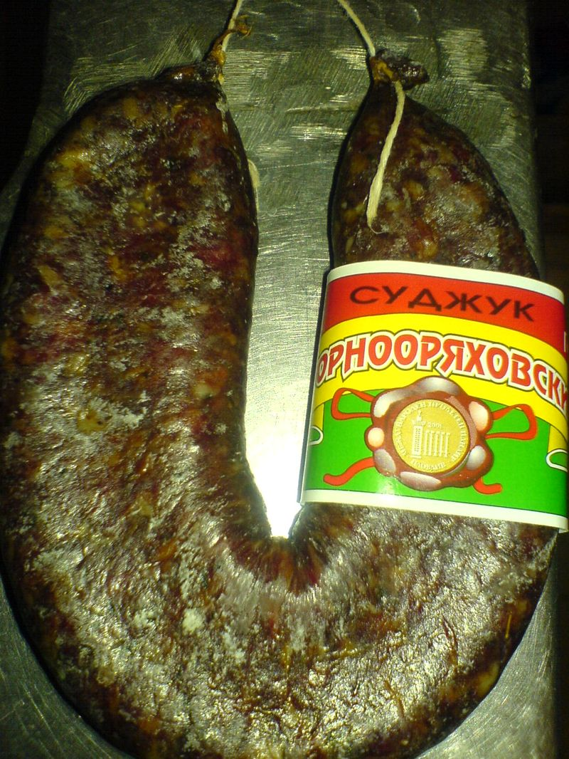 Sudjuk from Gorna Orjahovica, Bulgaria